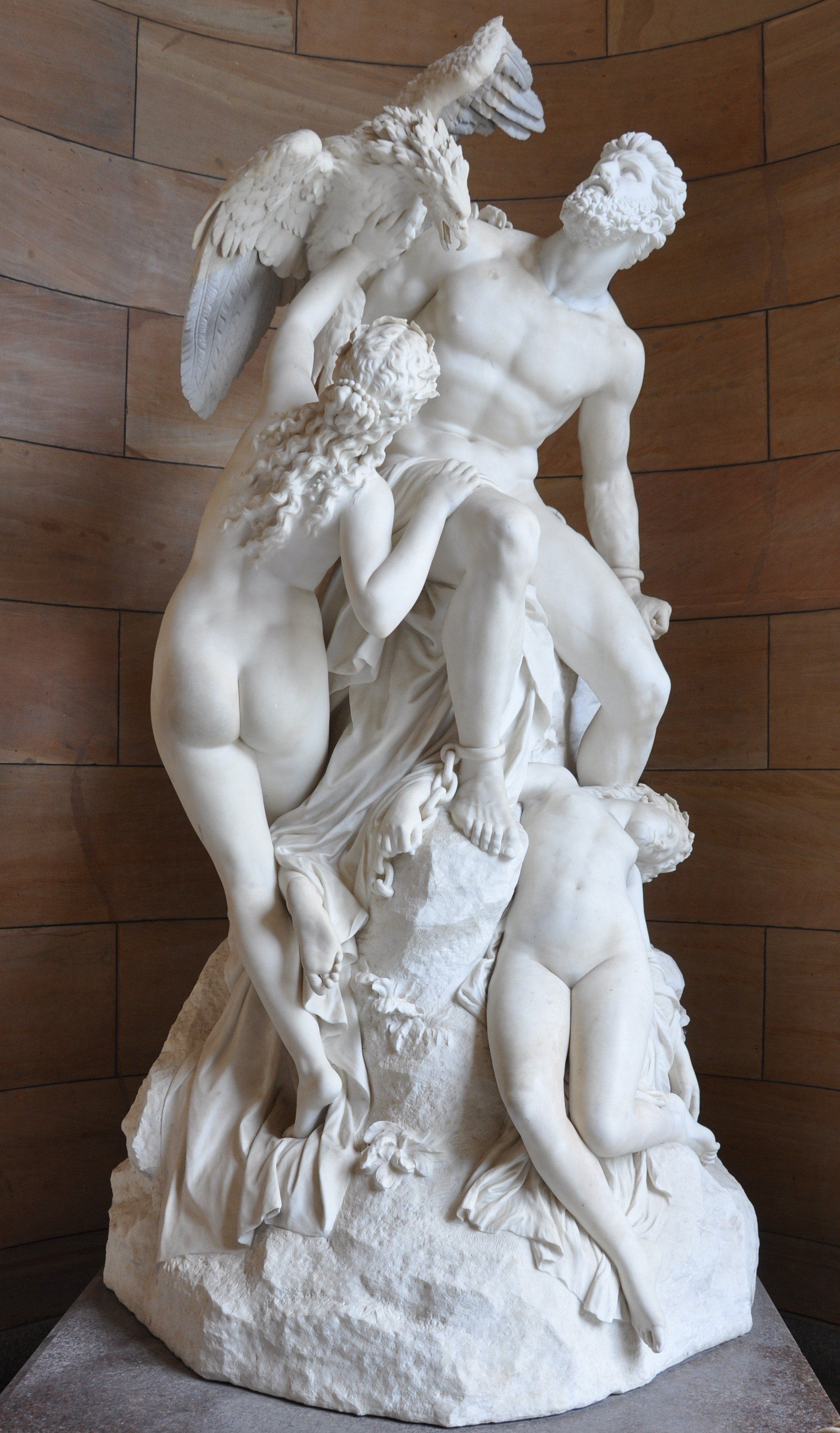 Prometheus, beklagt von den Okenaiden von Eduard Müller (1828–1895), Entwurf 1868, Ausführung in Marmor 1872–1879, Alte Nationalgalerie Berlin (aufgestellt außen im Eingangsbereich)